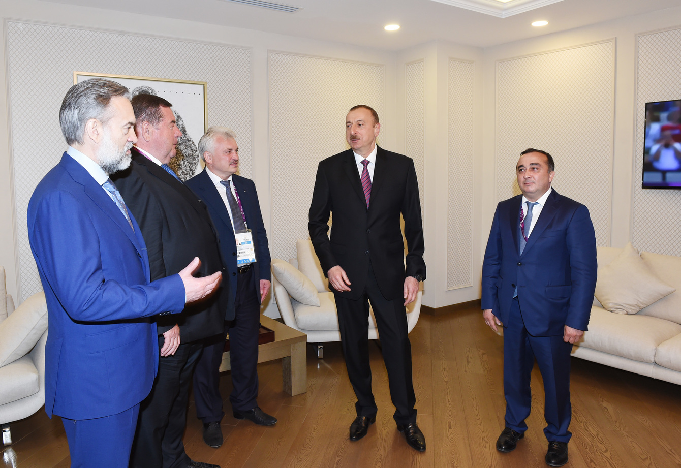 İlham Əliyevə Beynəlxalq Sambo Federasiyası İcraiyyə Komitəsinin qərarı ilə Sambonun Çempion kəməri təqdim edilməsi